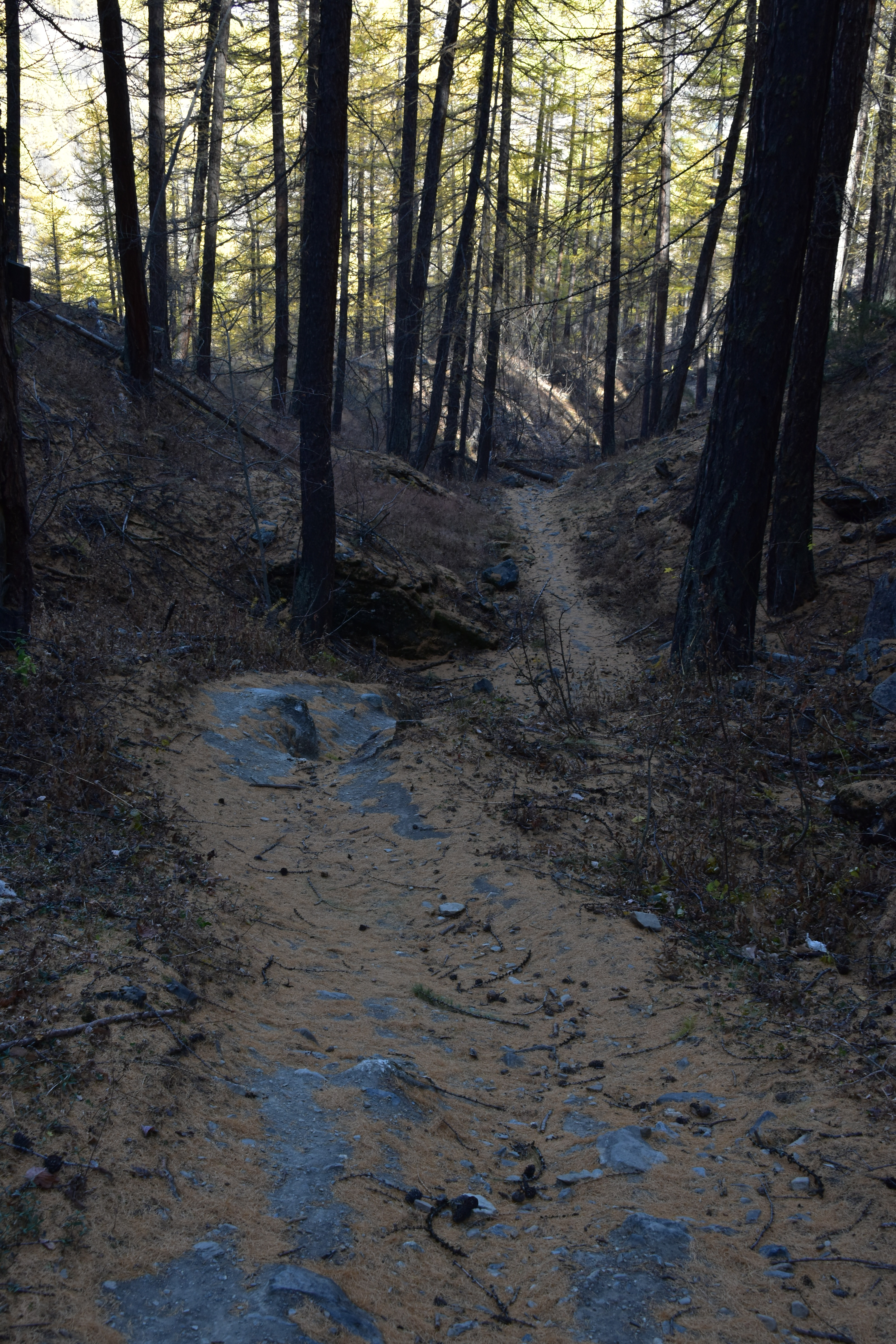 Le sentier de grande randonnée 54 au Monêtier-les-Bains.